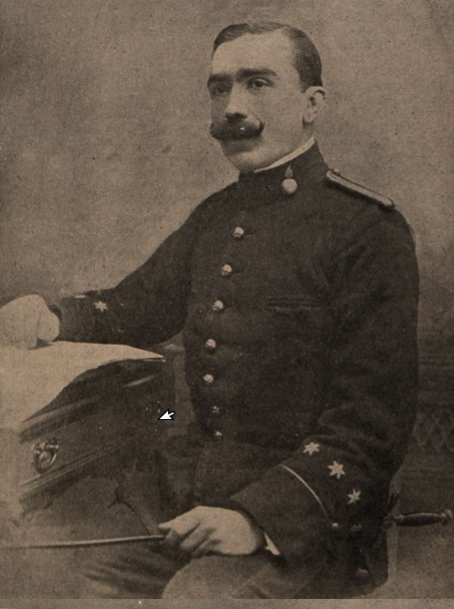 Óscar Pérez Solís (Juan Salvador —su pseudónimo—). Ex capitán de artillería y notable propagandista socialista, que recientemente ha tenido que separarse del ejército.